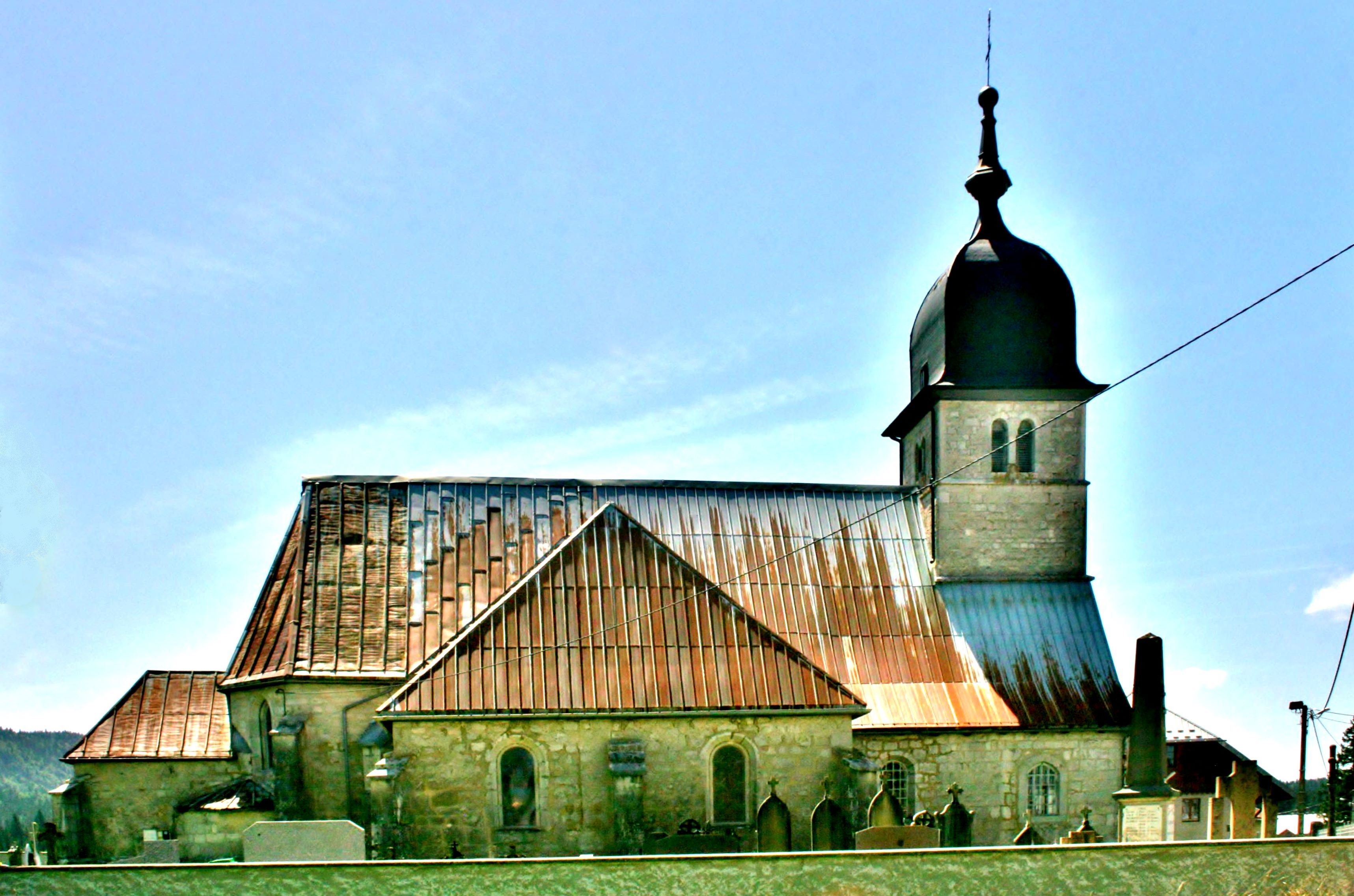 Eglise de chapelle-des-Bois. Doubs